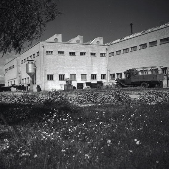 "המגפר" , בית חרושת לתעשיית סחורות גומי, חידוש ותיקון צמיגים , במפרץ-חיפה